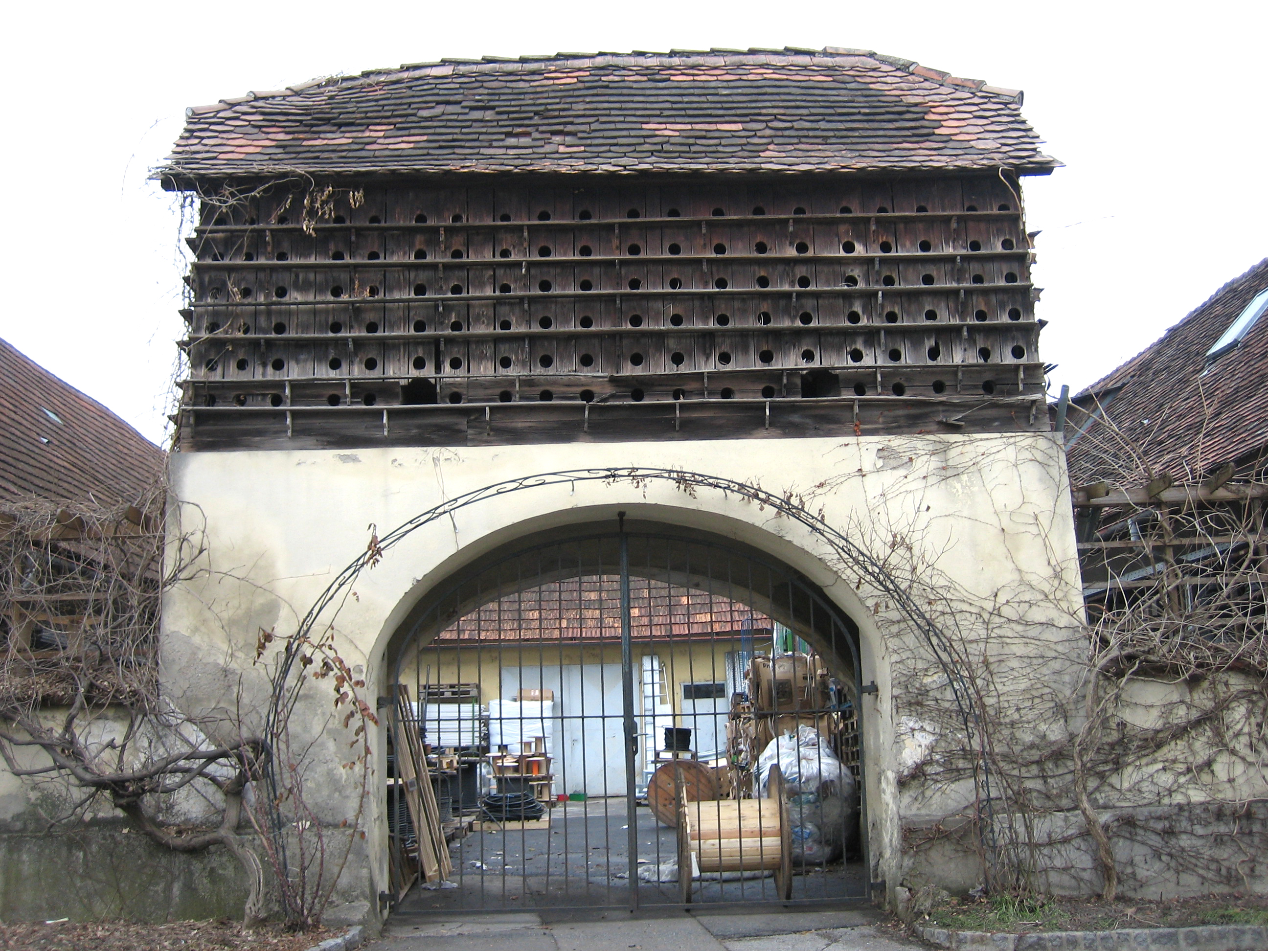 Taubenschlag